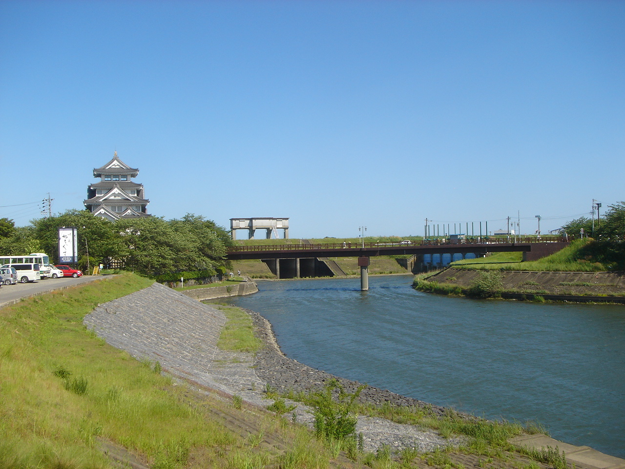 Saikawa(犀川 (岐阜県)),Ogaki,Gifu,Japan(岐阜県大垣市)で撮影